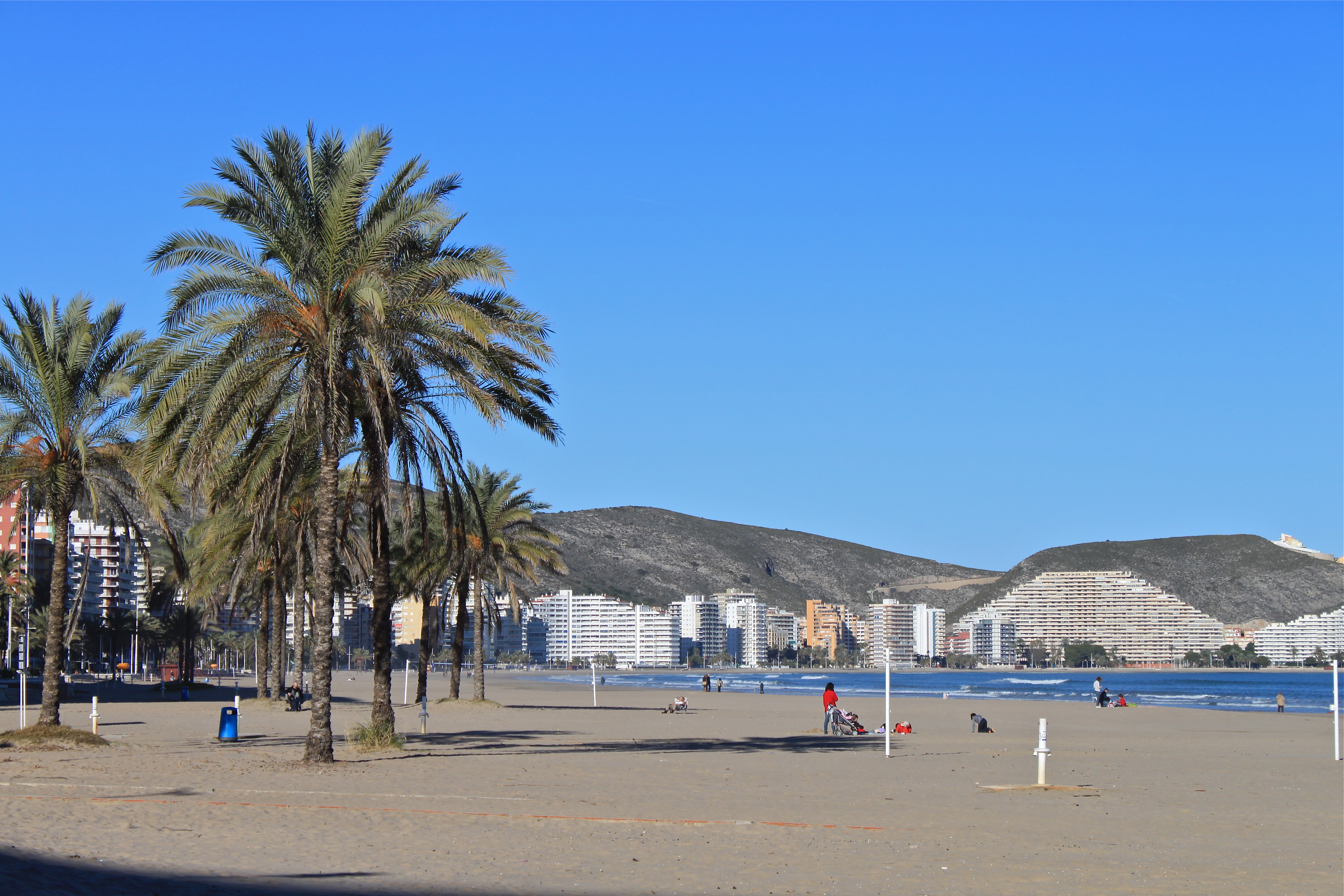 Cullera